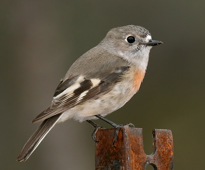 Petroica boodang female